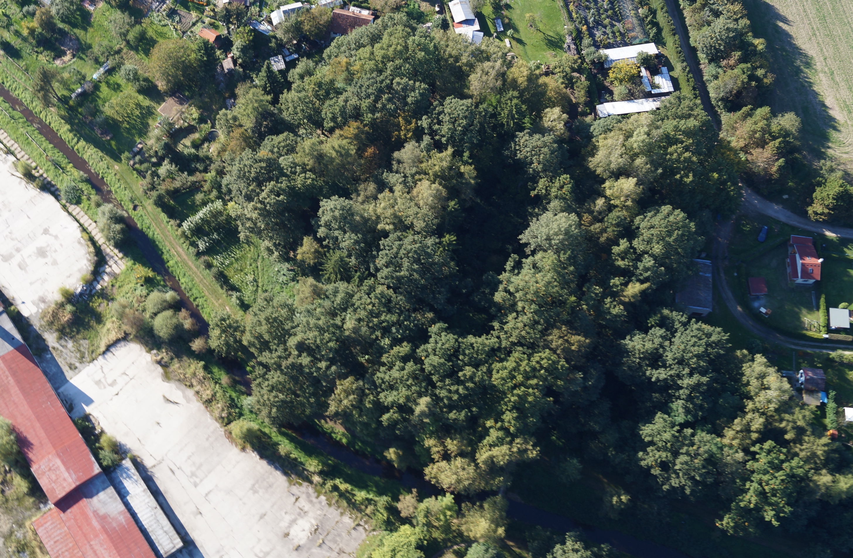 Tvrz Talíř, archeologické stopy (Veselí nad Lužnicí), S od města, Veselí nad Lužnicí